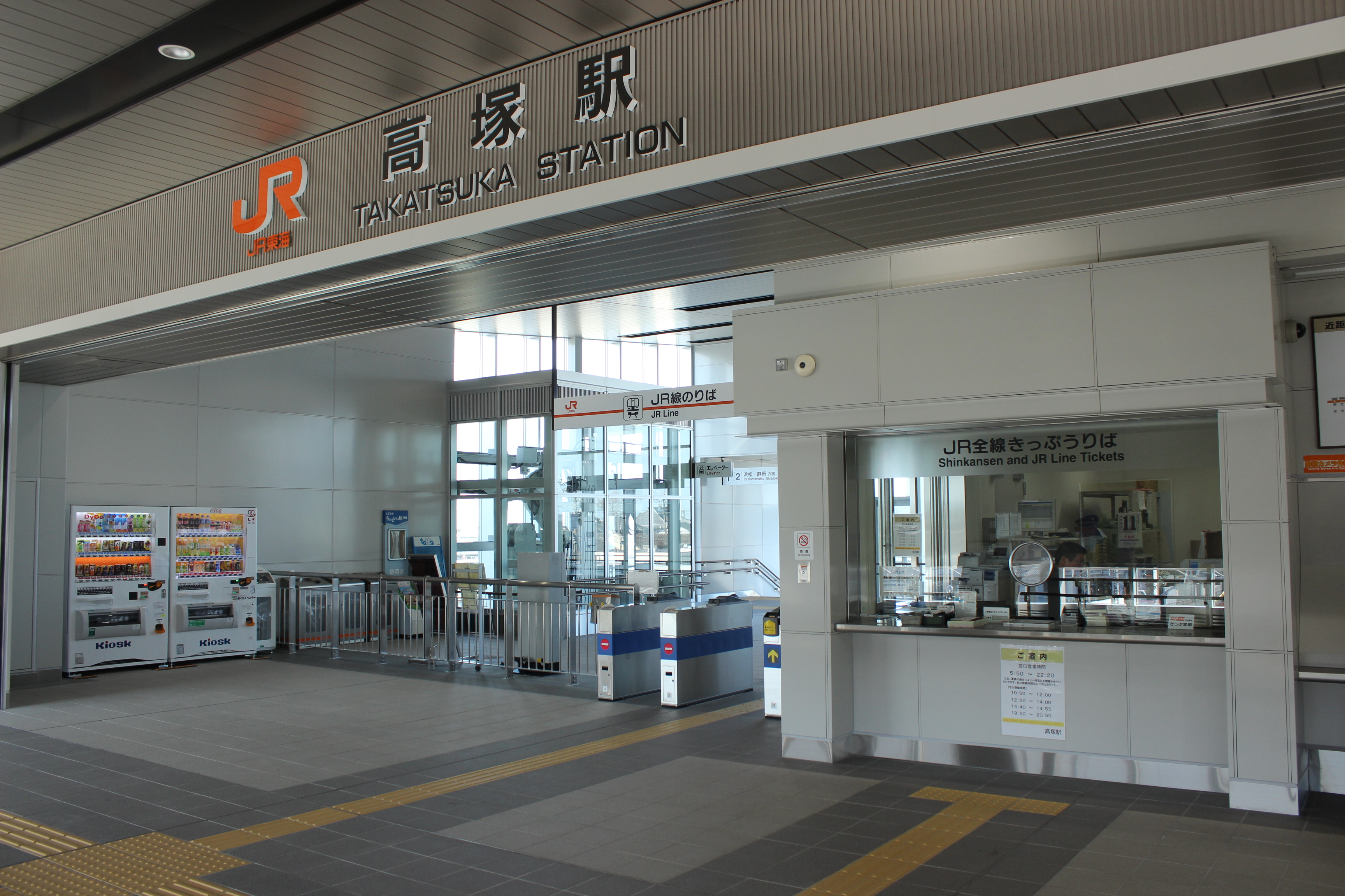 高塚駅新駅舎改札口